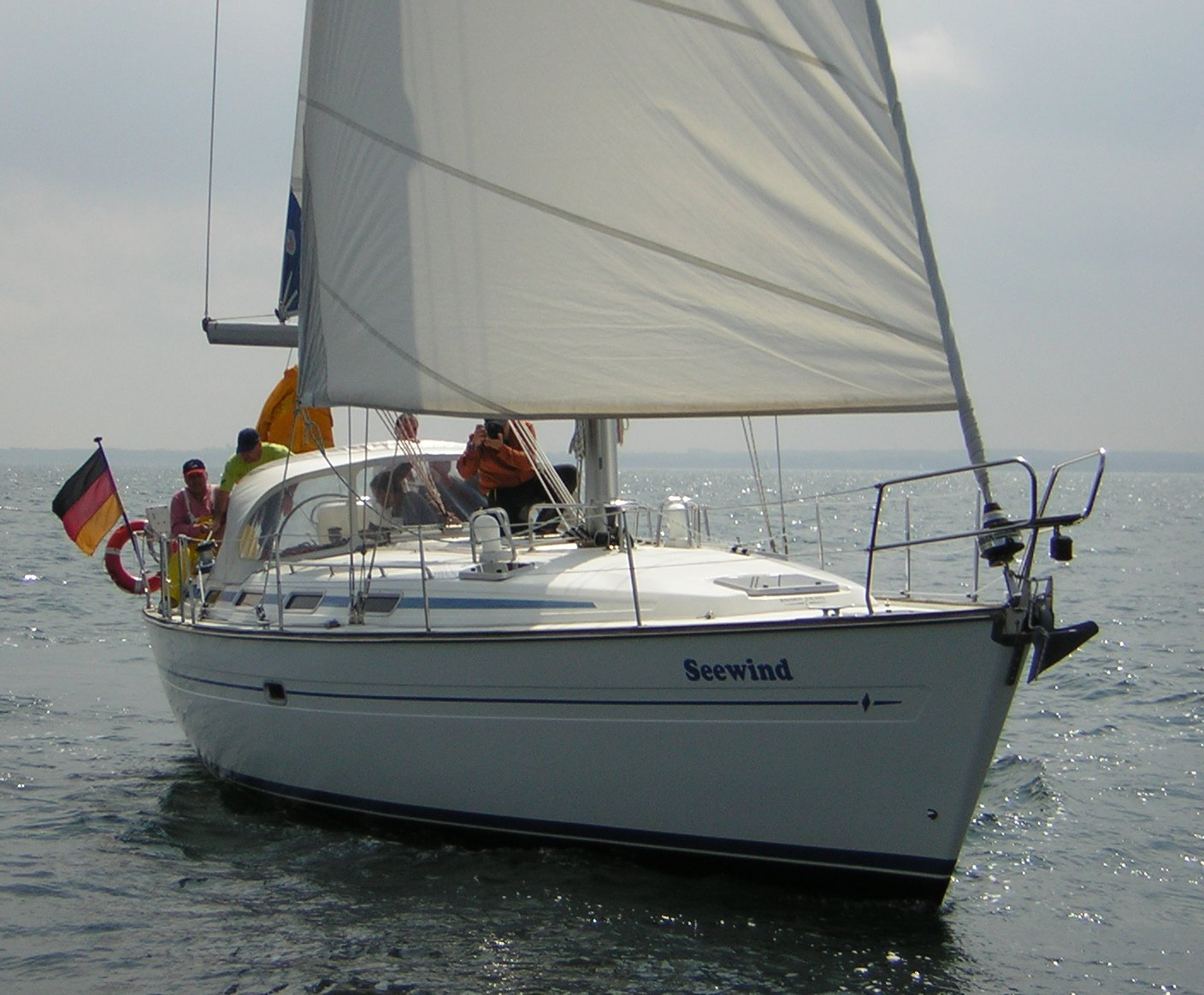 Bavaria 42